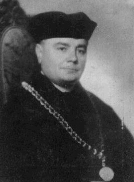 Josef Šíma český katolický kněz a církevní právník